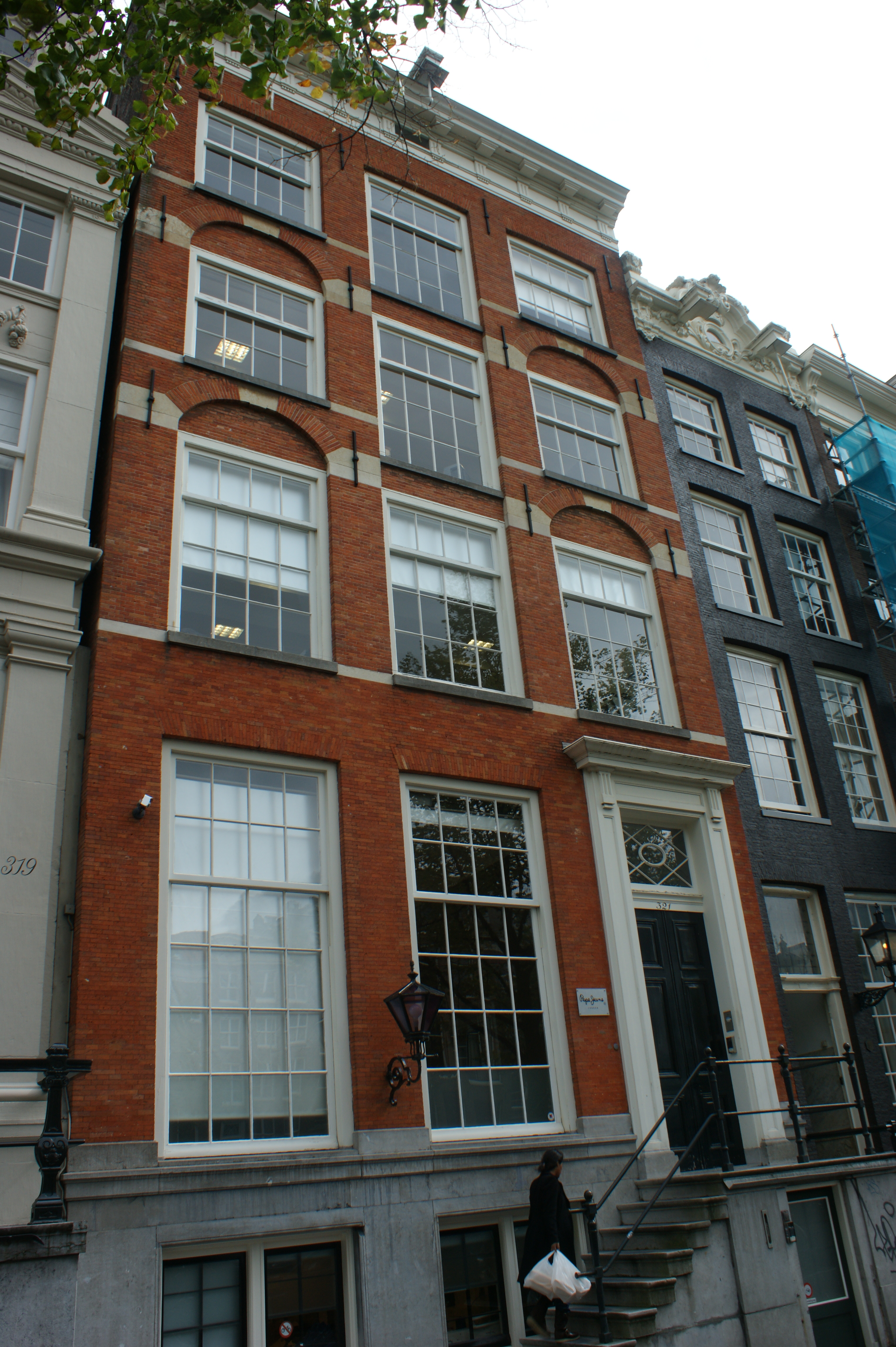 Amsterdam, Keizersgracht 321. House owned by Han van Meegeren as of 1943.